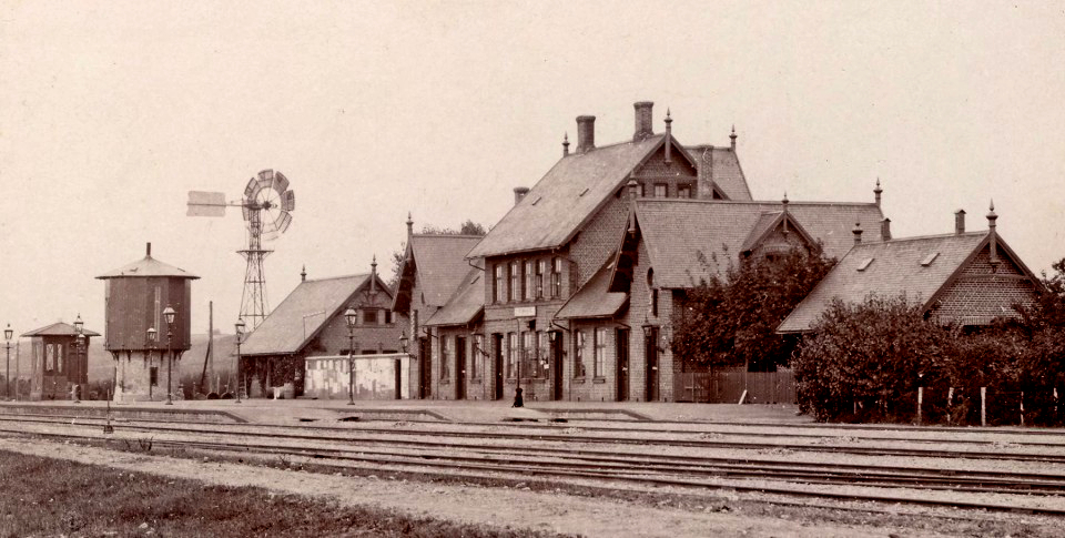 Ryomgard 1890